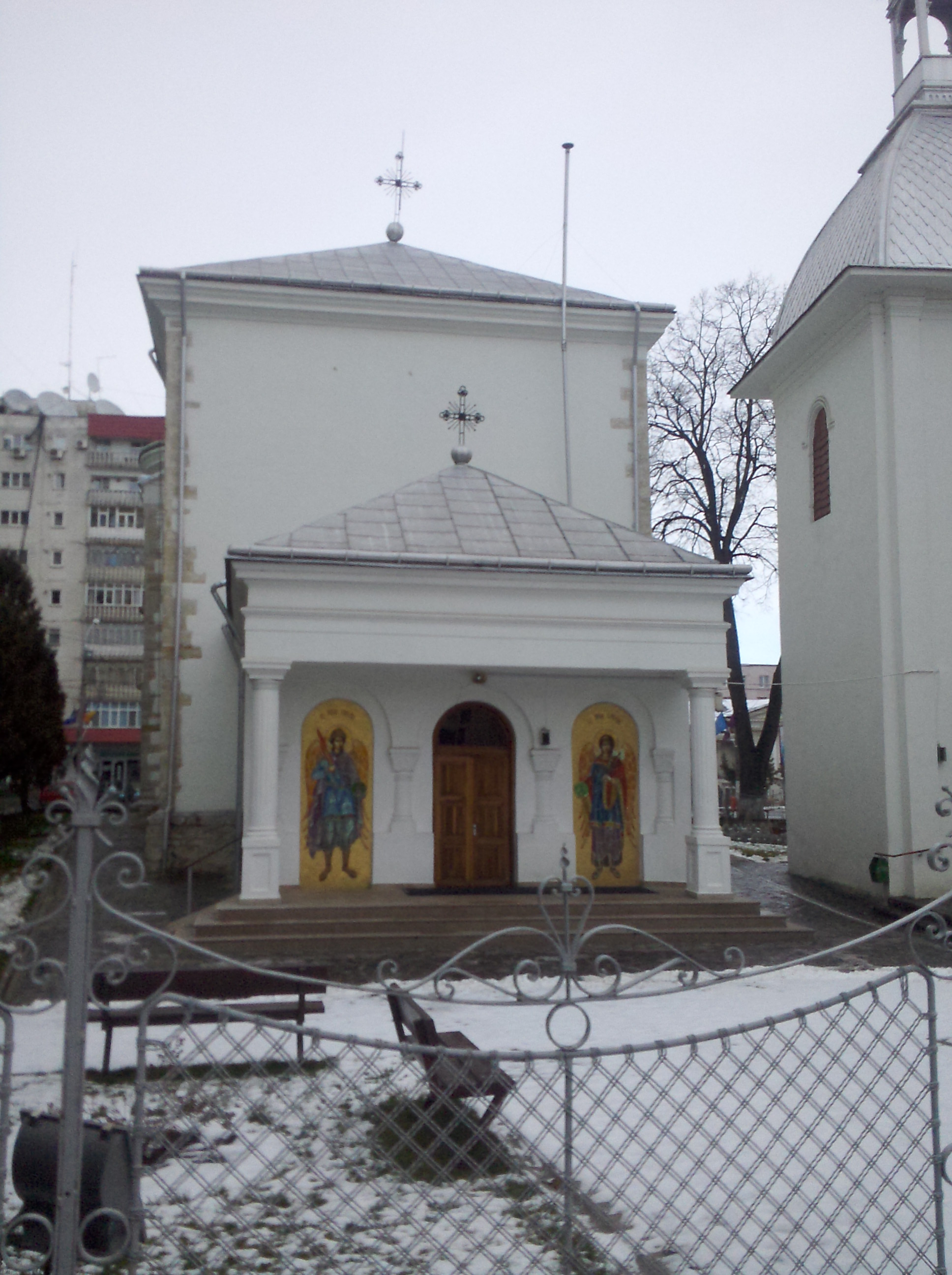 Biserica Sfinţii Voievozi Roman